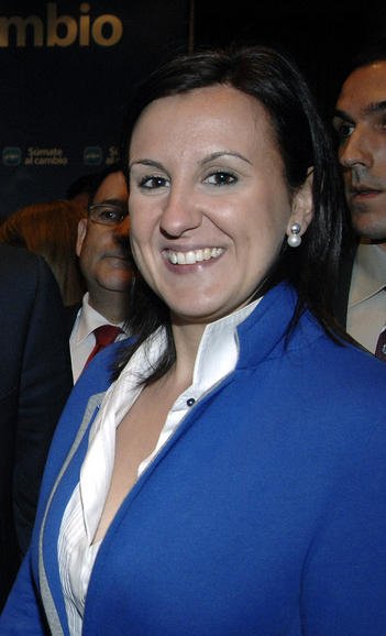 Maria José Català a un míting del PP a Torrent